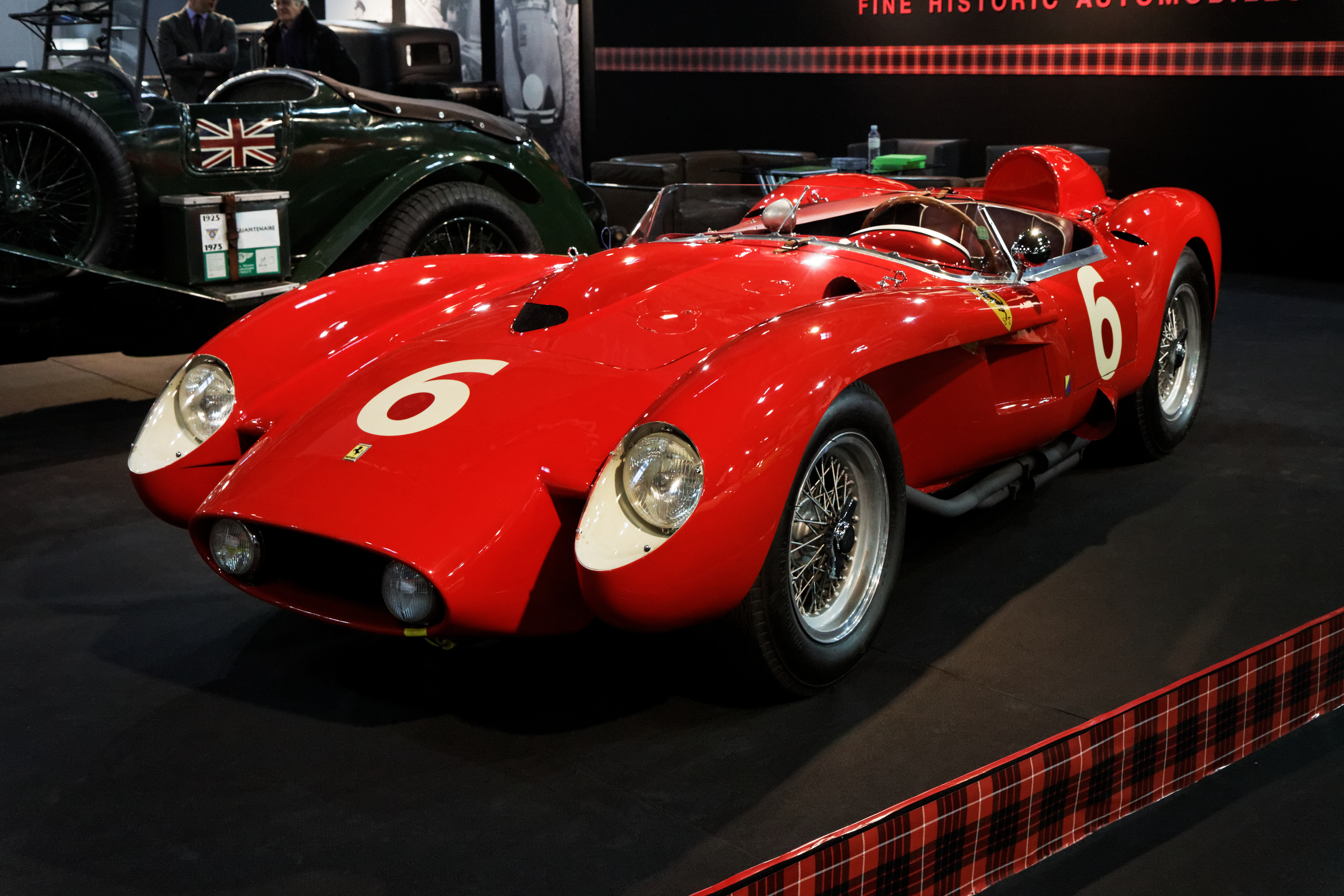 Une Ferrari 250 Testa Rossa 250 présentée lors du salon Retromobile 2013.